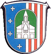 Wappen von Beselich